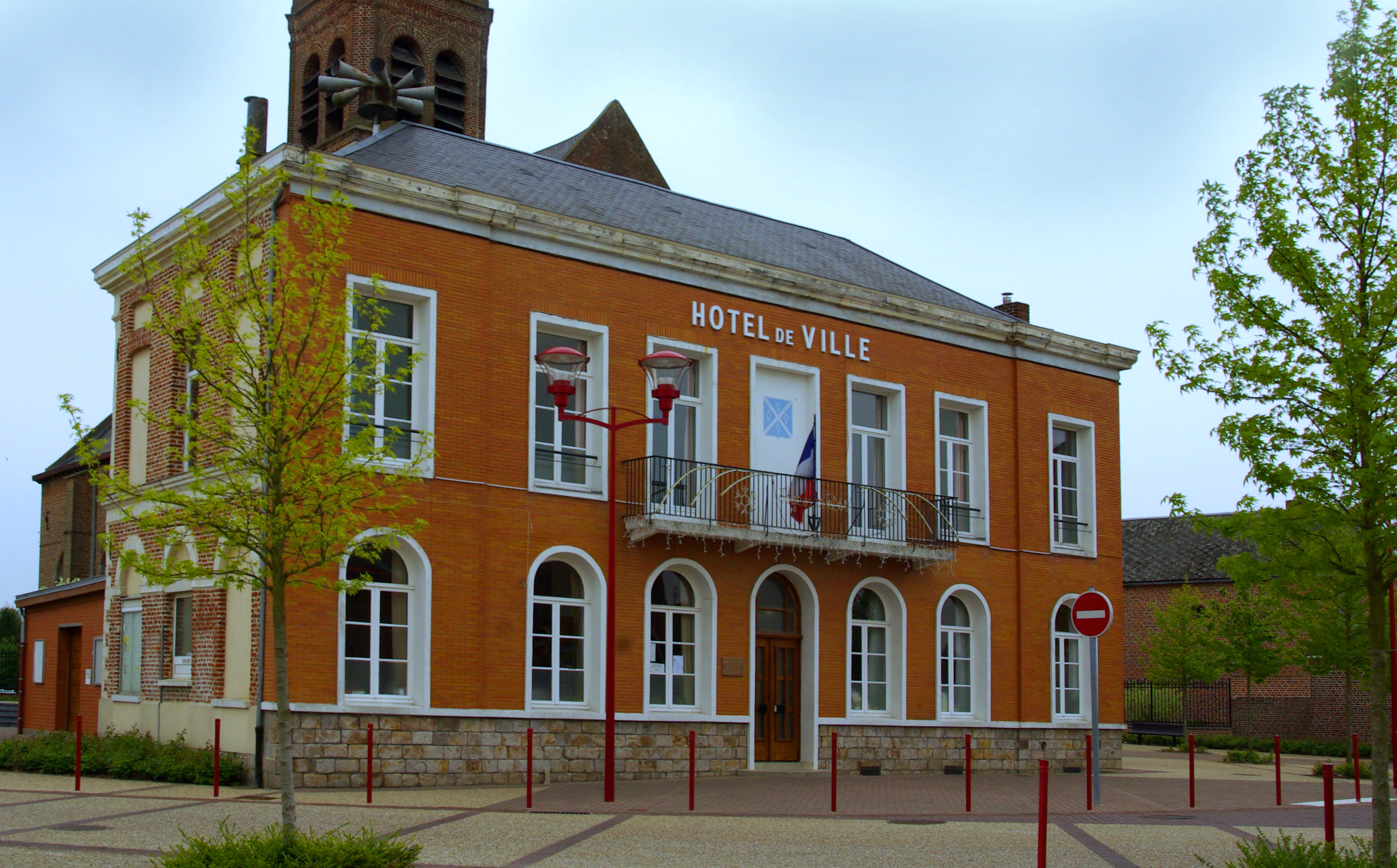 Mairie de Quarouble